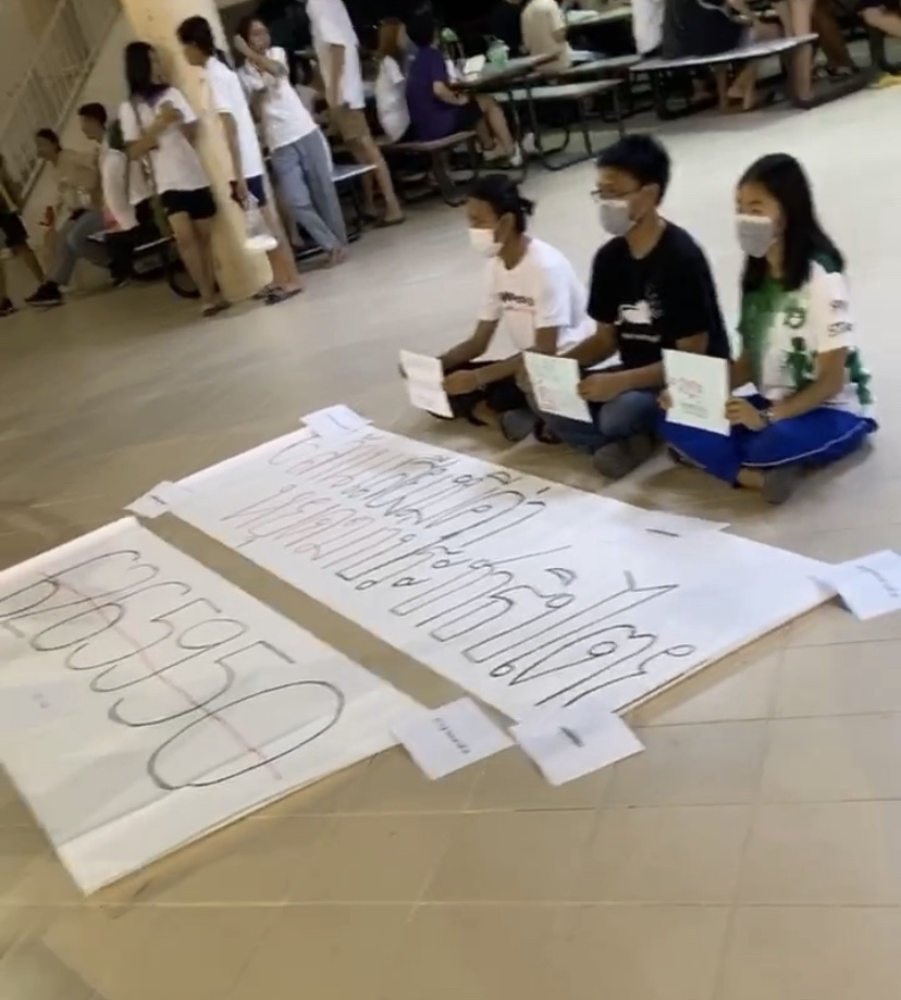 มศว ประท้วงการยุบพรรคอนาคตใหม่ ที่ มศว องครักษ์